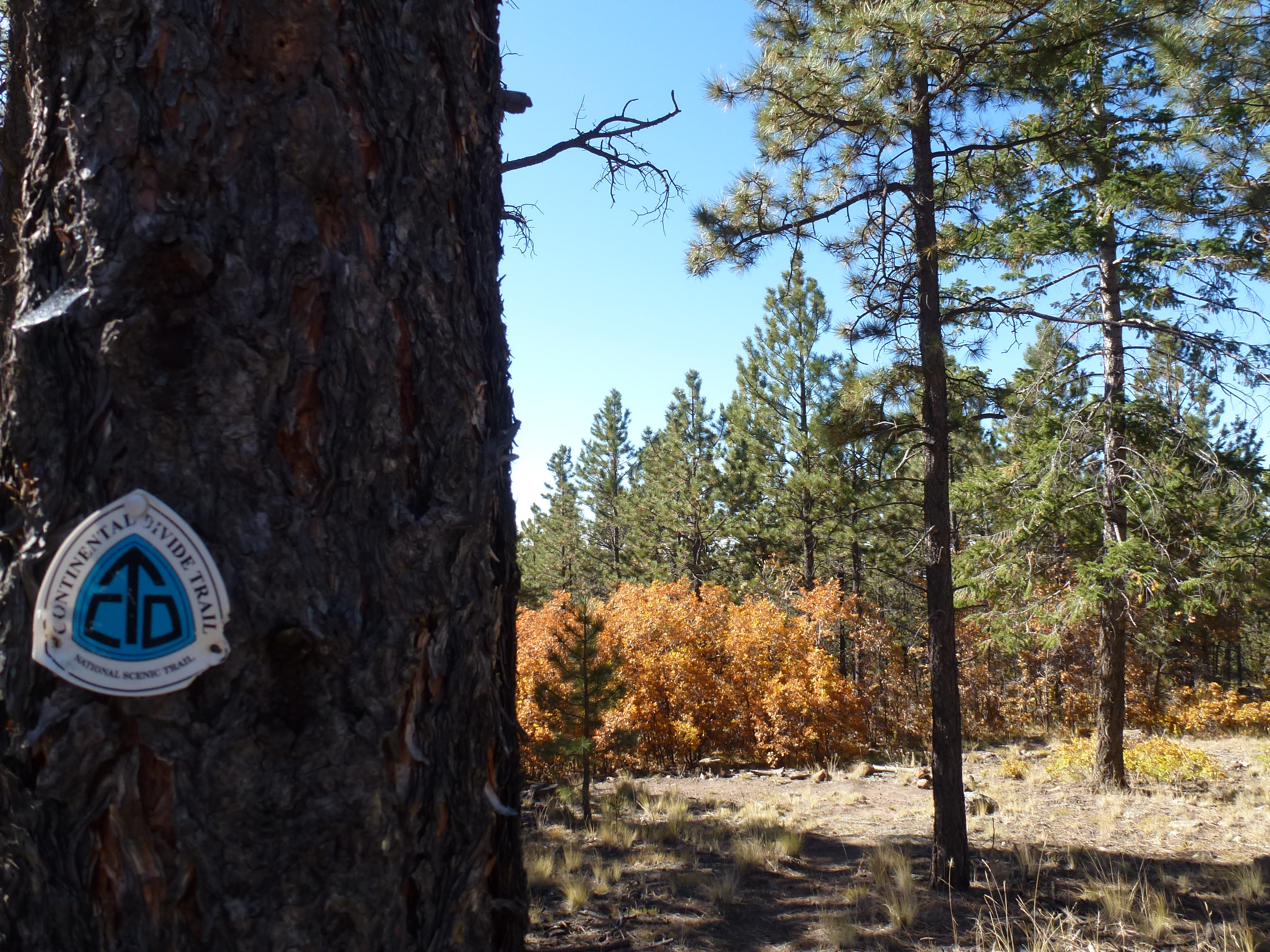 Continental Divide Trail, 2012